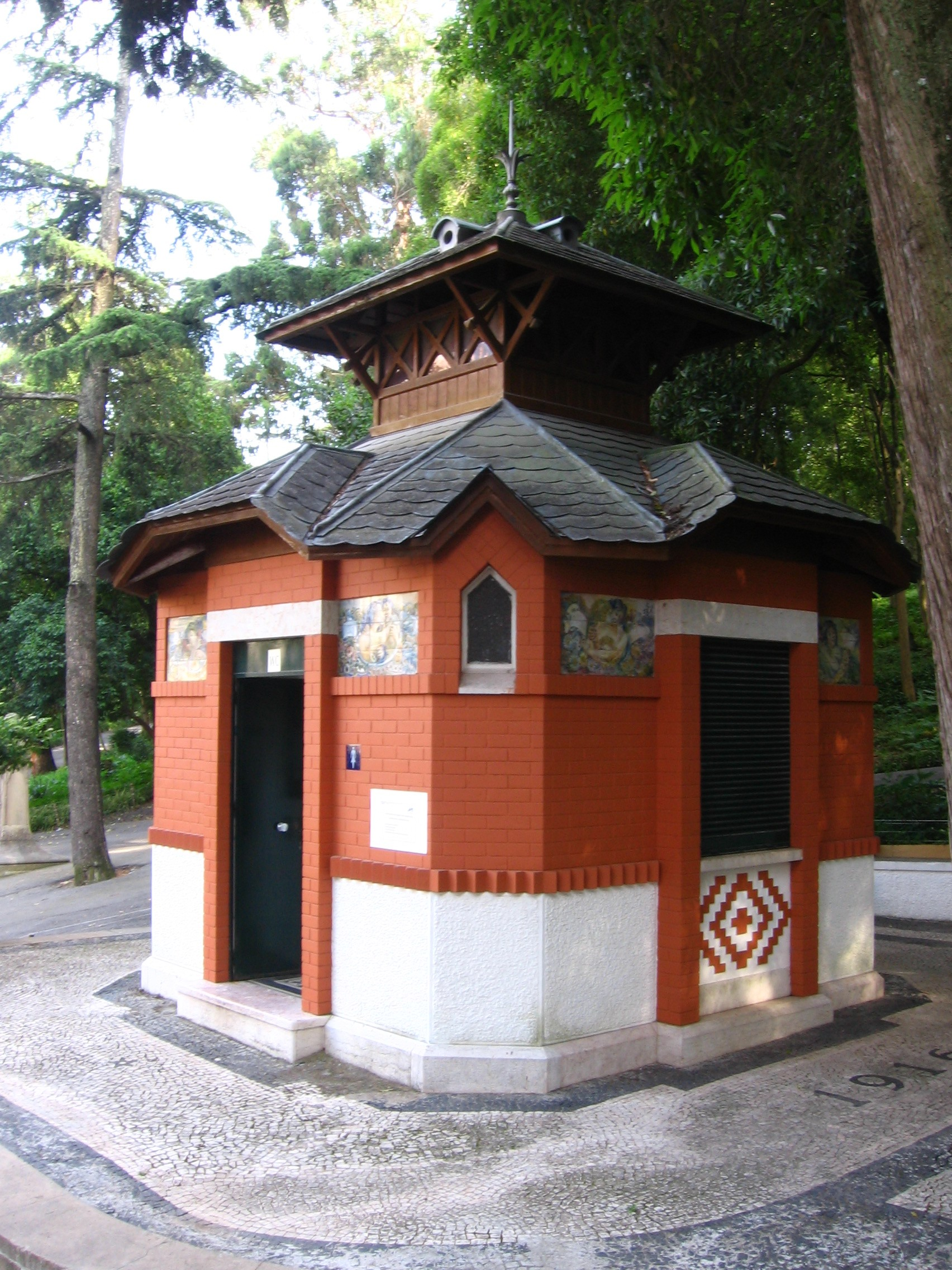 Quiosque do Parque Silva Porto, Lisboa